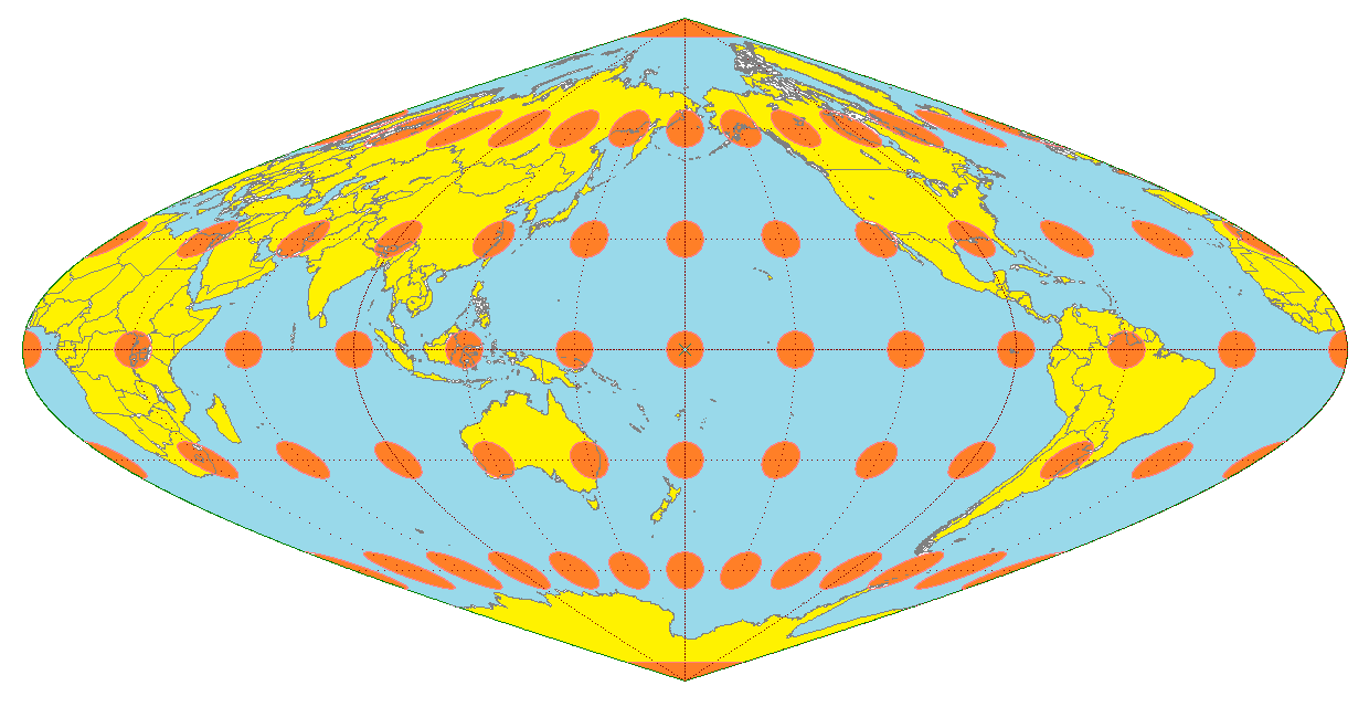 サンソン図法の場合のテイソーの指示楕円